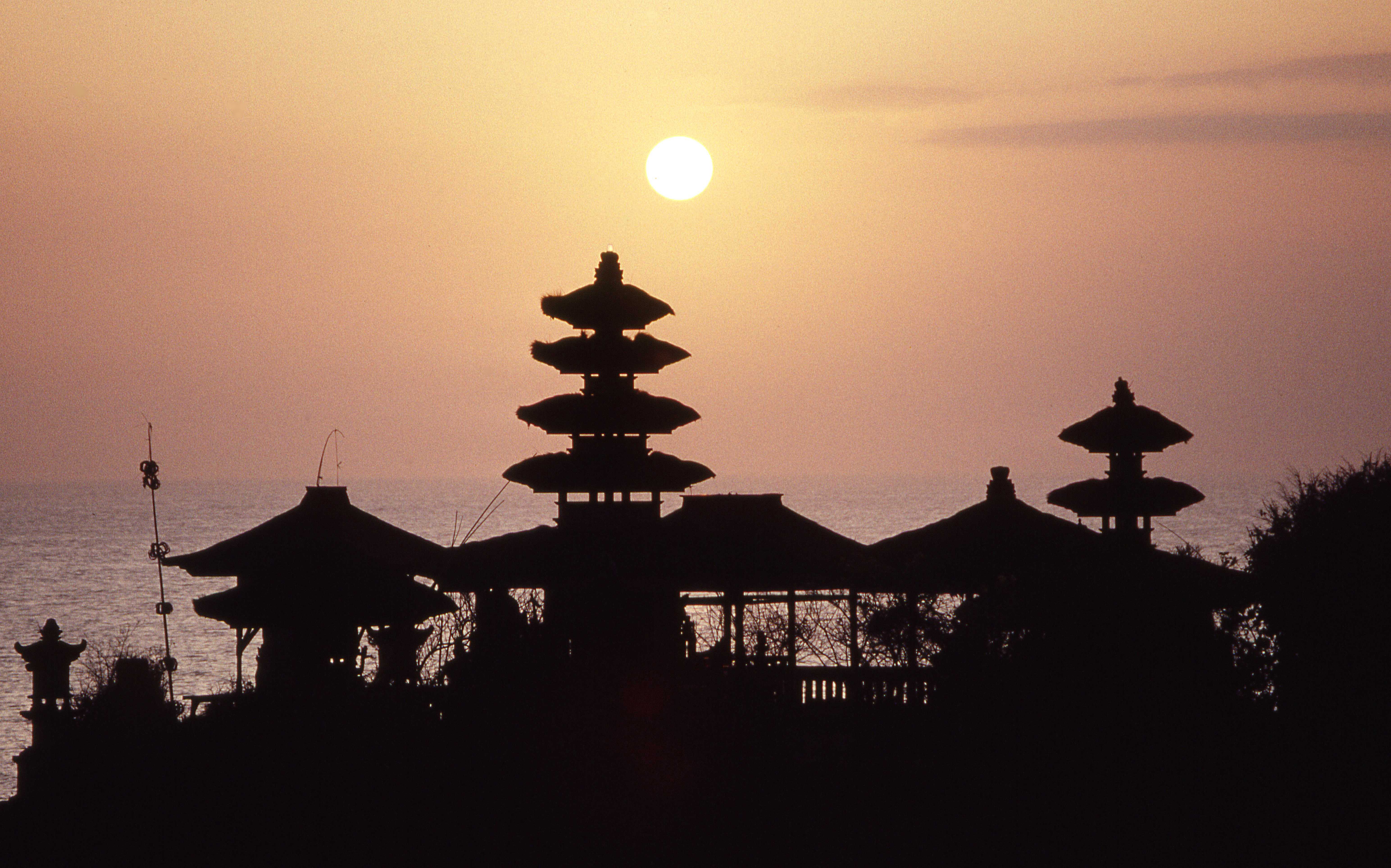 Indonésien,_Bali_Tanah_Lot_628.jpg nikon f 801